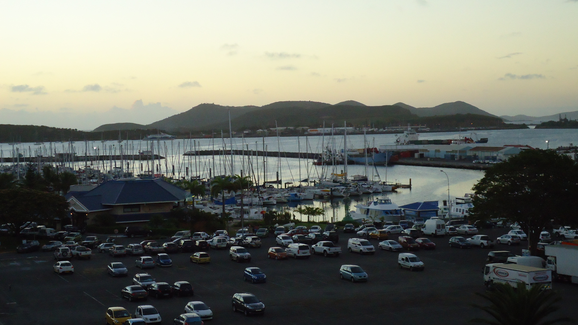 Port du quartier de Port-Moselle